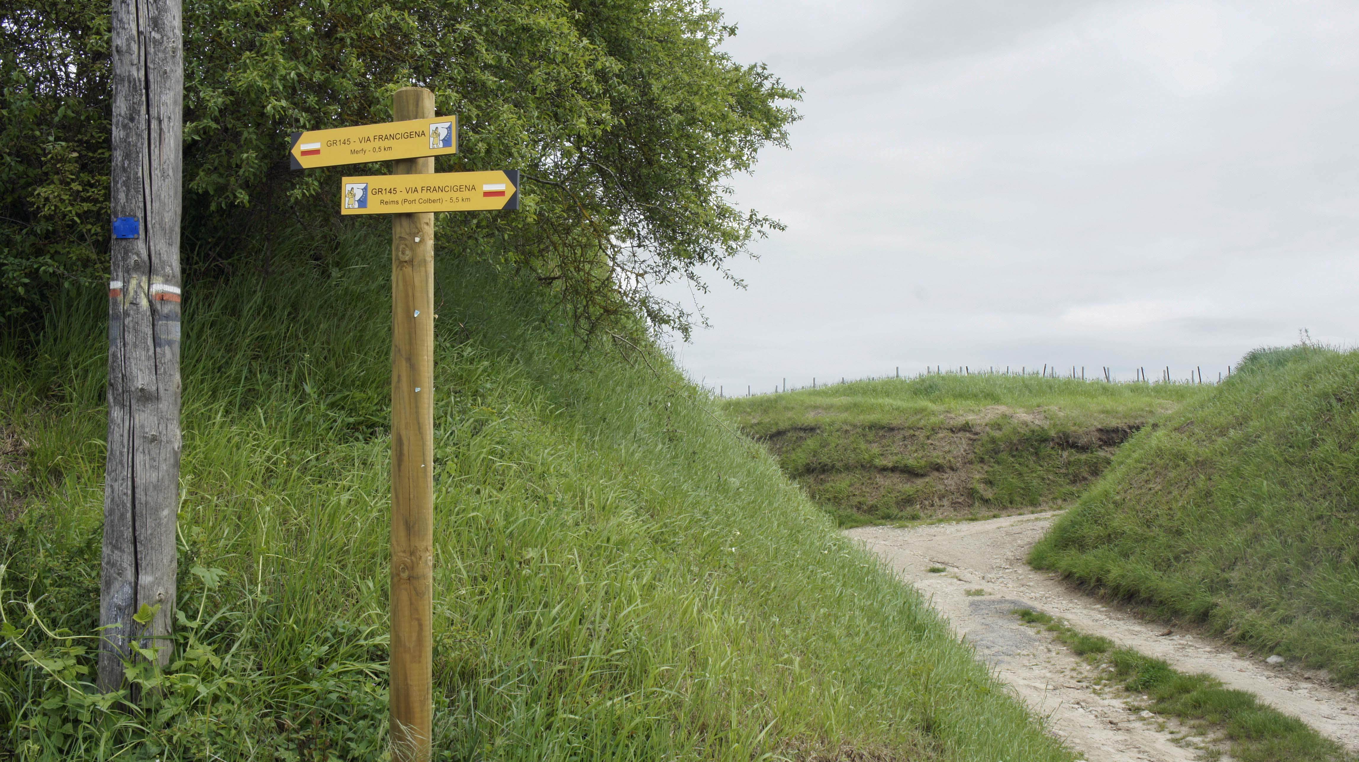 La Via Francigena traversant le Massif de st-Thierry, GR 145.